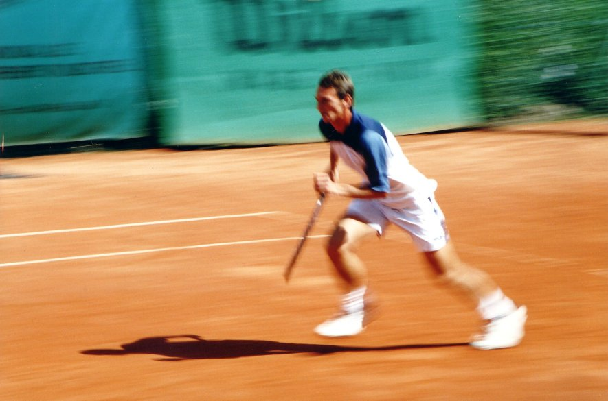 Julien Boutter